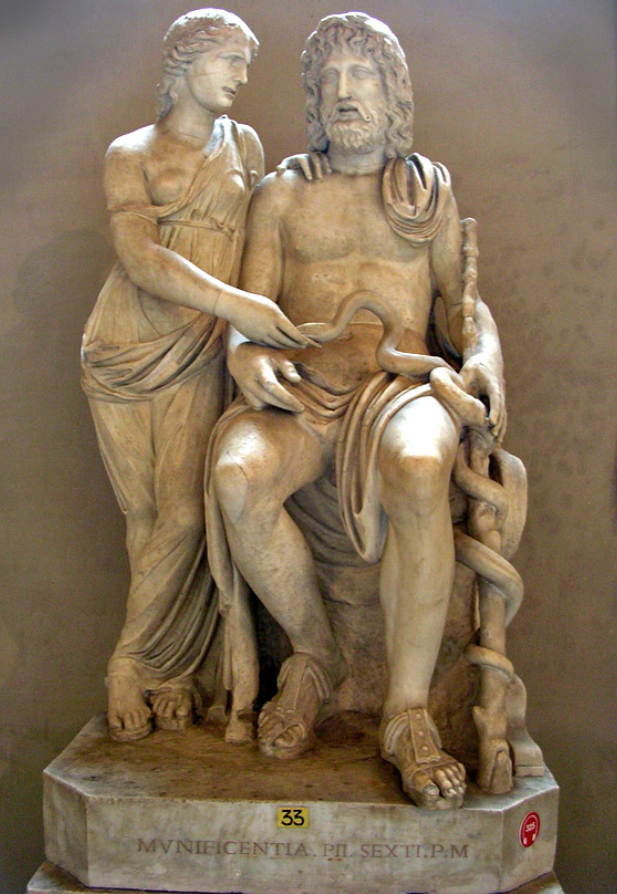 Скульптура Асклепия и Гигиеи. Мрамор. Римская копия эпохи Адриана с позднеэллинистического оригинала. Инв. № 571. Рим, Ватиканские музеи, Музей Пия—Климента, Галерея статуй, 33.